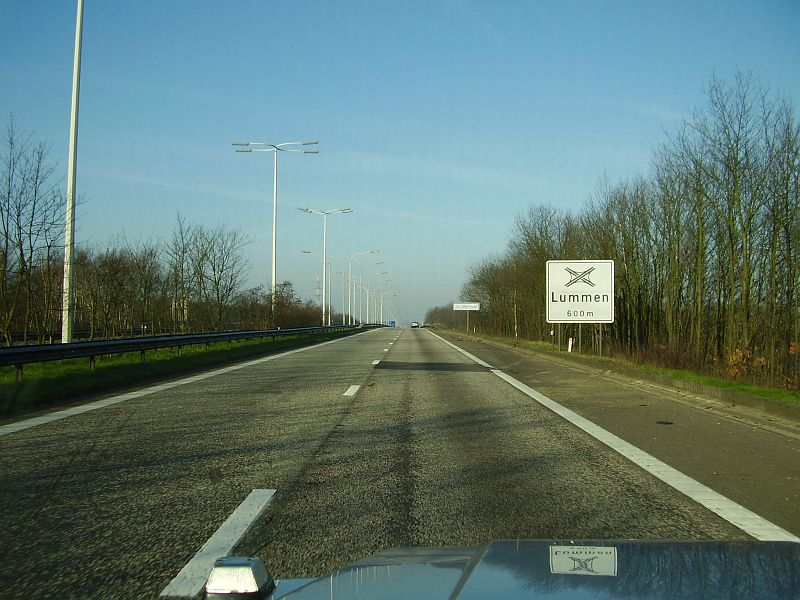 Echengeur de Lummen en Belgique